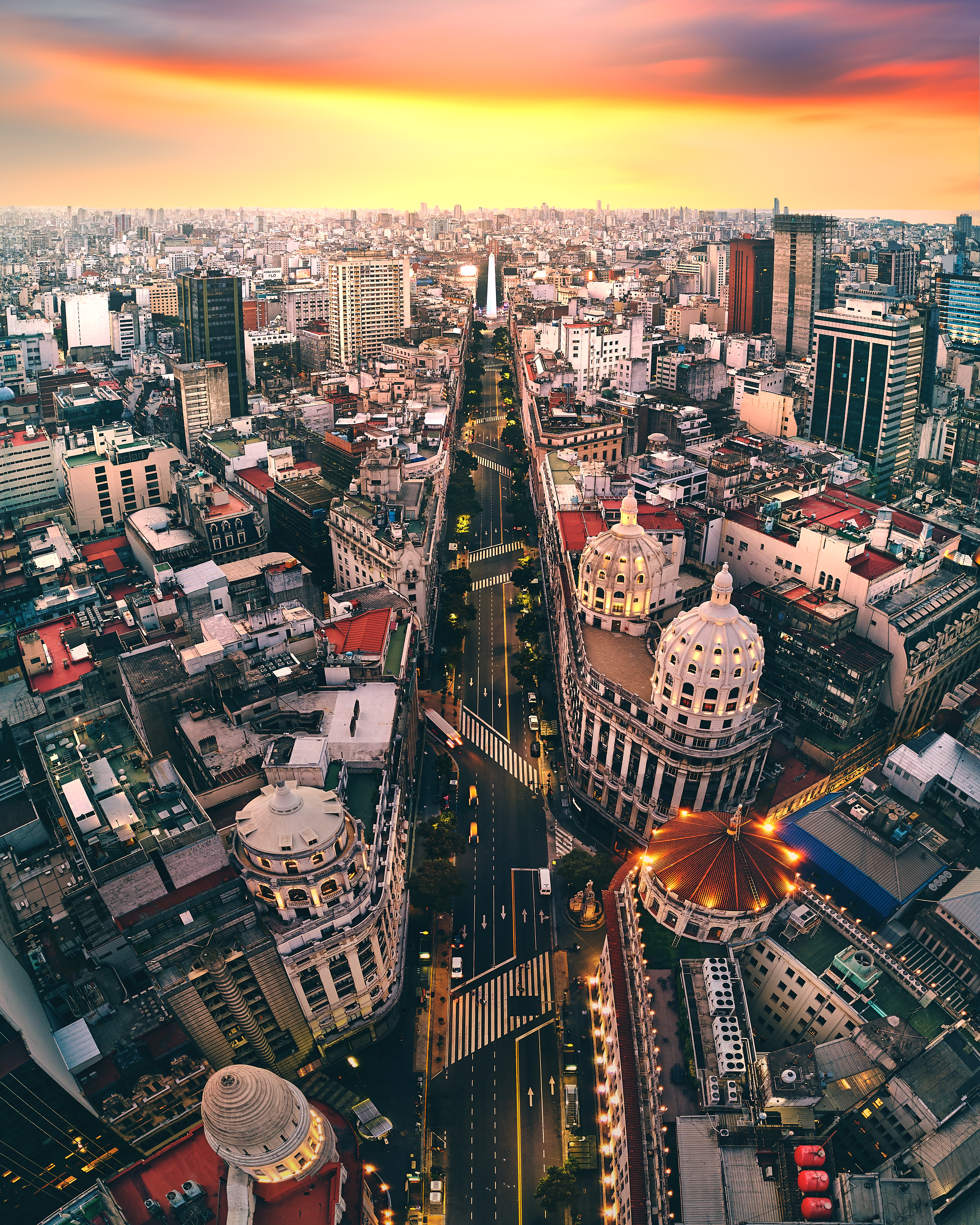 Diagonal Norte, Buenos Aires